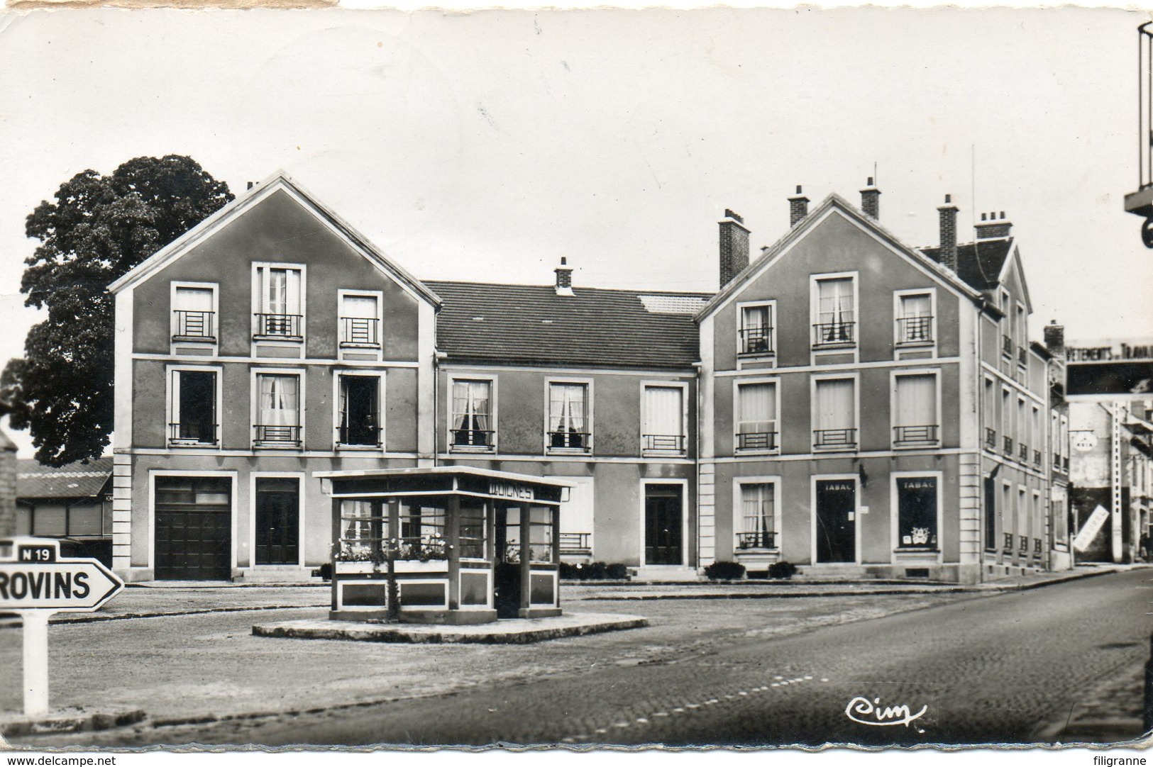 Centre-ville de Guignes